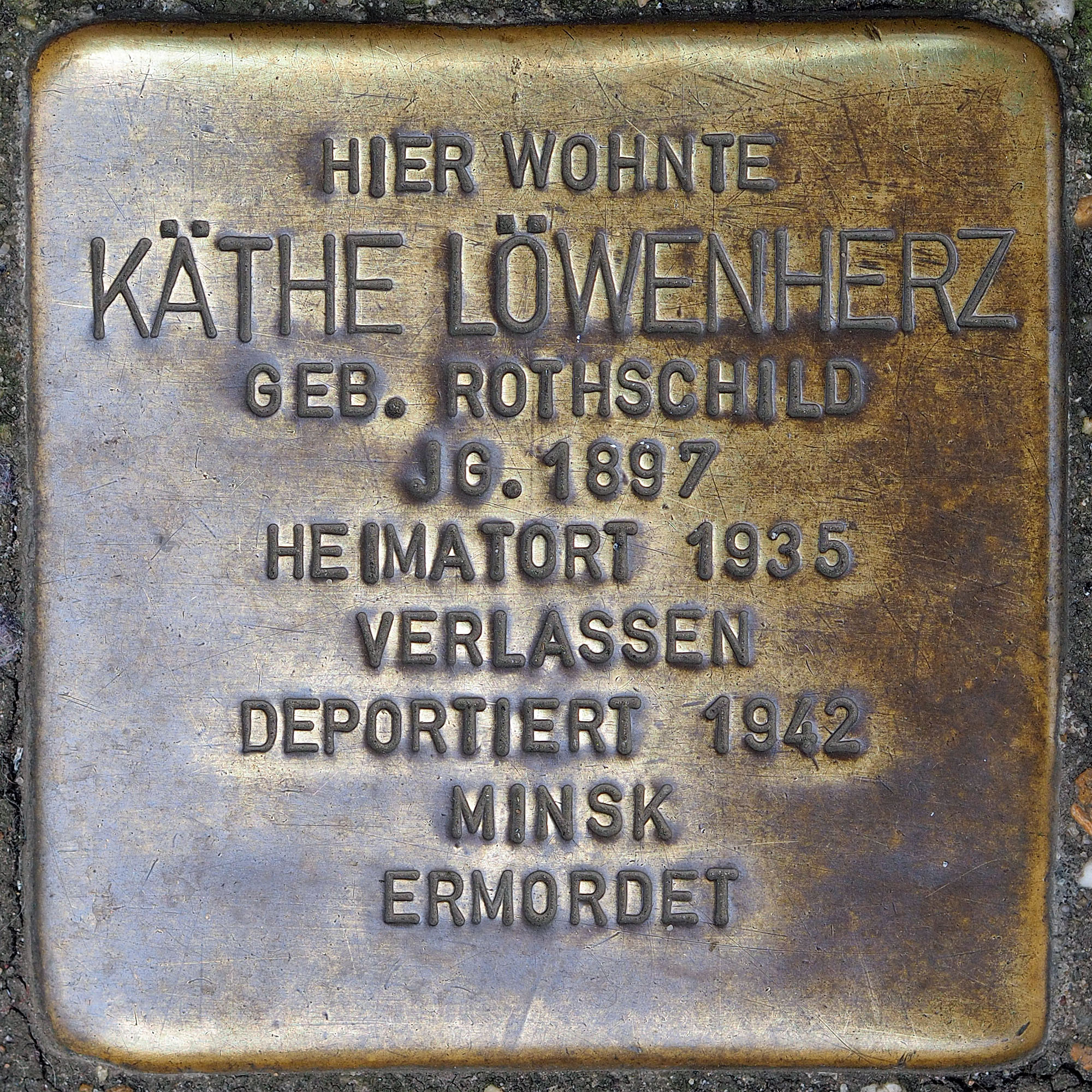 Stolpersteine GV: Löwenherz, Käthe